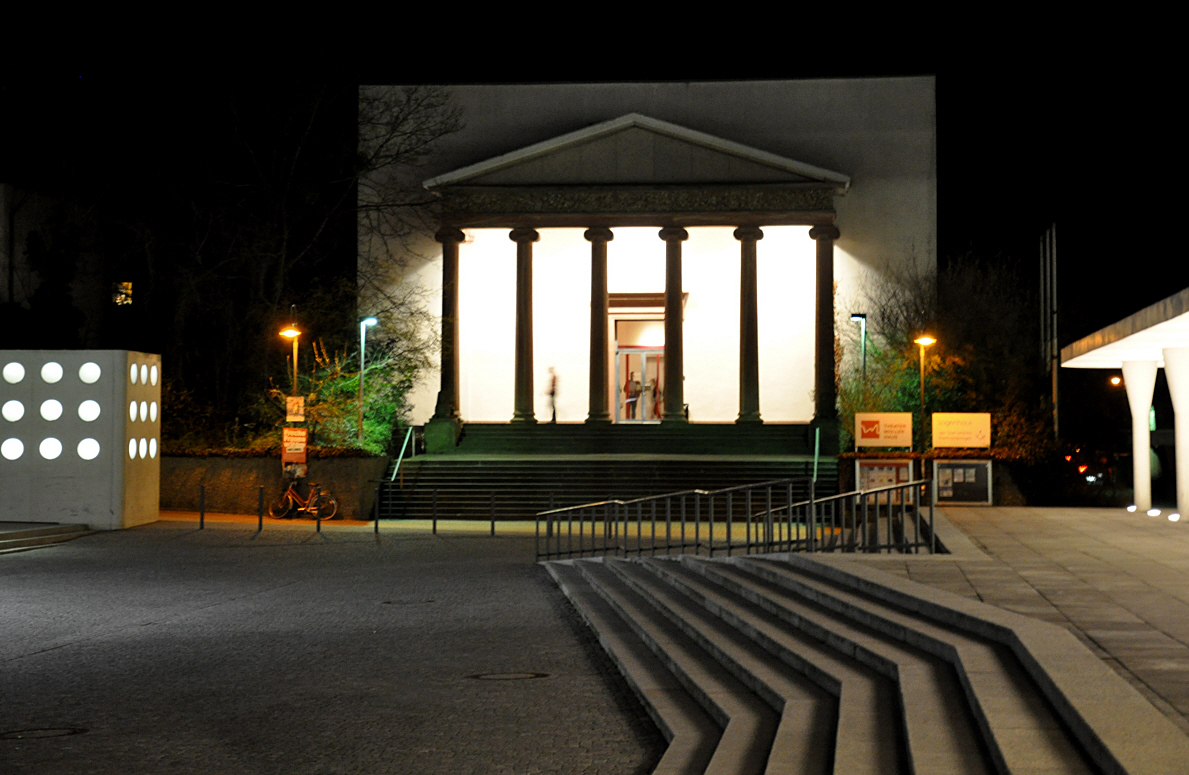 Darmstadt, Georg-Büchner-Platz mit Theater Mollerhaus